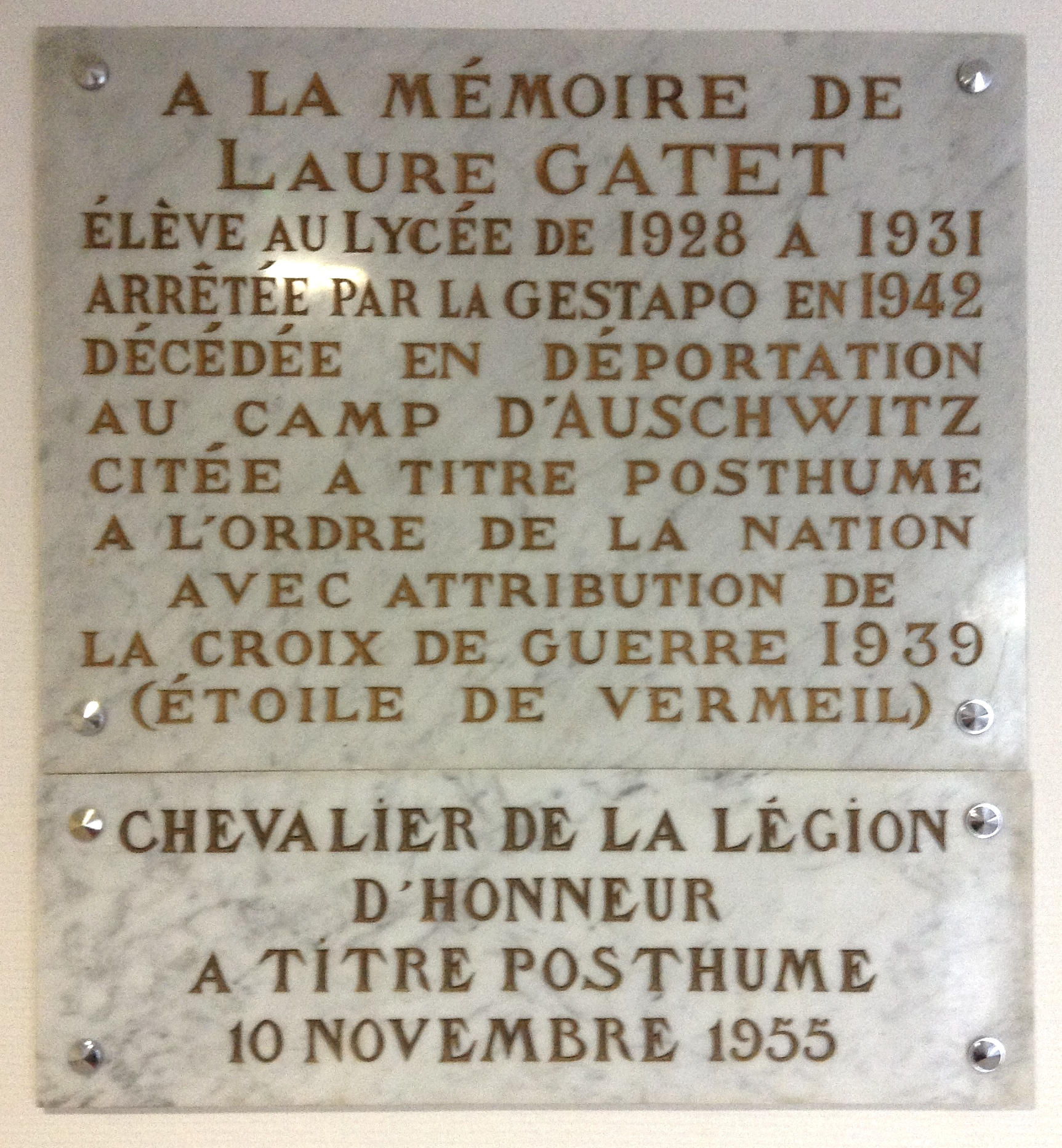 Plaque commémorative de Laure Gatet au lycée Laure-Gatet, à Périgueux (Dordogne, France).